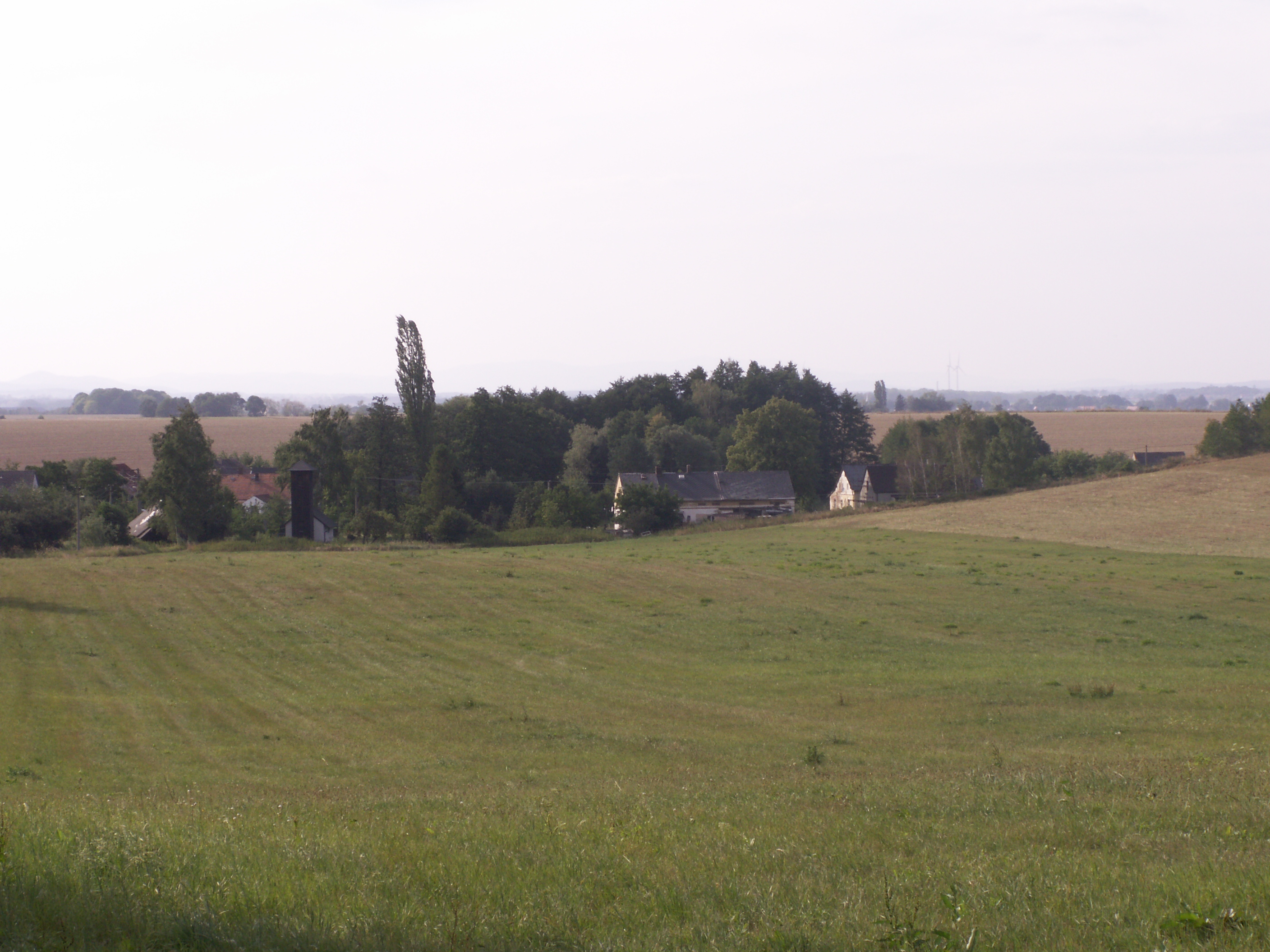 Horní Heřmanice, část obce Bernartice, okres Jeseník